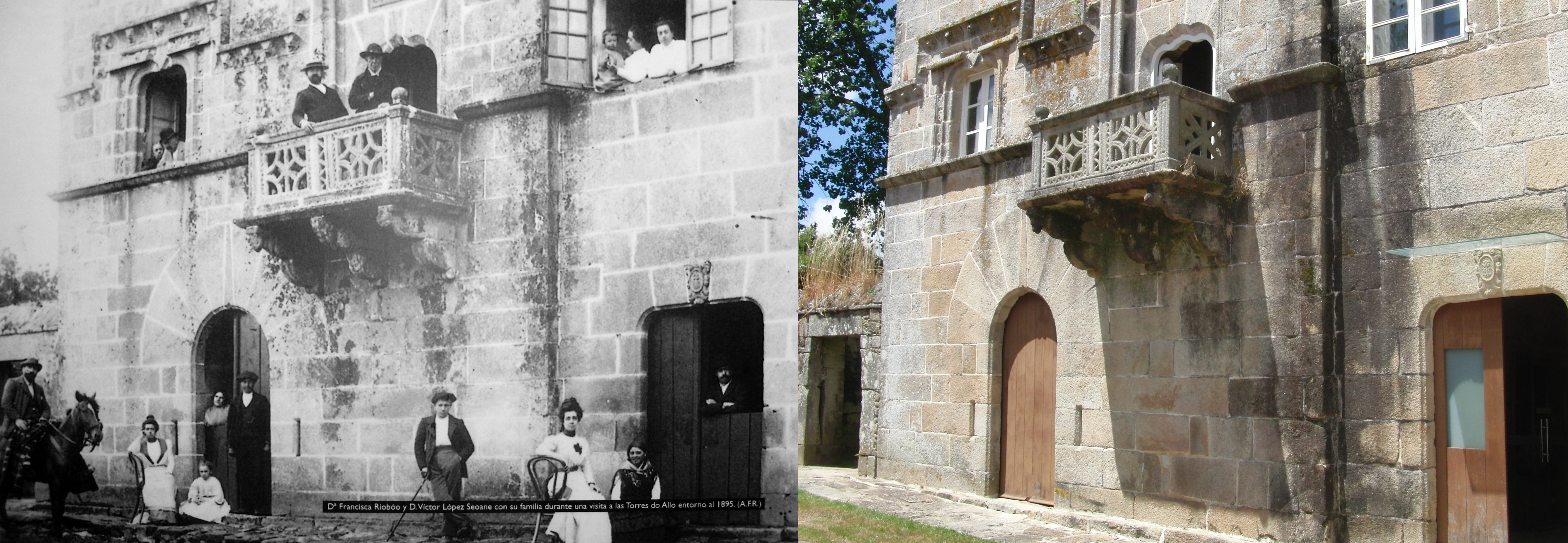 En la fotografía tomada en las Torres do Allo sobre 1895 aparecen: Los cabezas de familia Riobóo de entonces, Victor López Seoane y Francisca Riobóo asomados a la ventana del extremo de la torre Sur. De Izquierda a Derecha se puede identificar abajo y montado a Caballo a su hijo mayor Víctor López Riobóo Seoane,al que acompaña, sentada en una silla su hermana Mercedes con una sobrina de la familia López-Perea. En la puerta de la Torre Sur, aparecen dos caseros de la familia Graíño que habitó la casa hasta los años 50. Doña Juana López Riobóo Seoane y asomado a la puerta de su izquierda Francisco López Riobóo Seoane. En la Planta Noble, junto al cura párroco de Allo, se encuentra asomado al balcón D. Antonio López Perea Seoane, marido de Doña María López Riobóo Seoane, y en la ventana del cuerpo central el pequeño Luis López y López Riobóo, hijo de los anteriores, junto a su madre y sostenido por su tía Elena López Riobóo Seoane. [más sobre las Torres do Allo en Volviendo la Vista Atrás] Visto en: Torres do Allo - Zas (A Coruña)